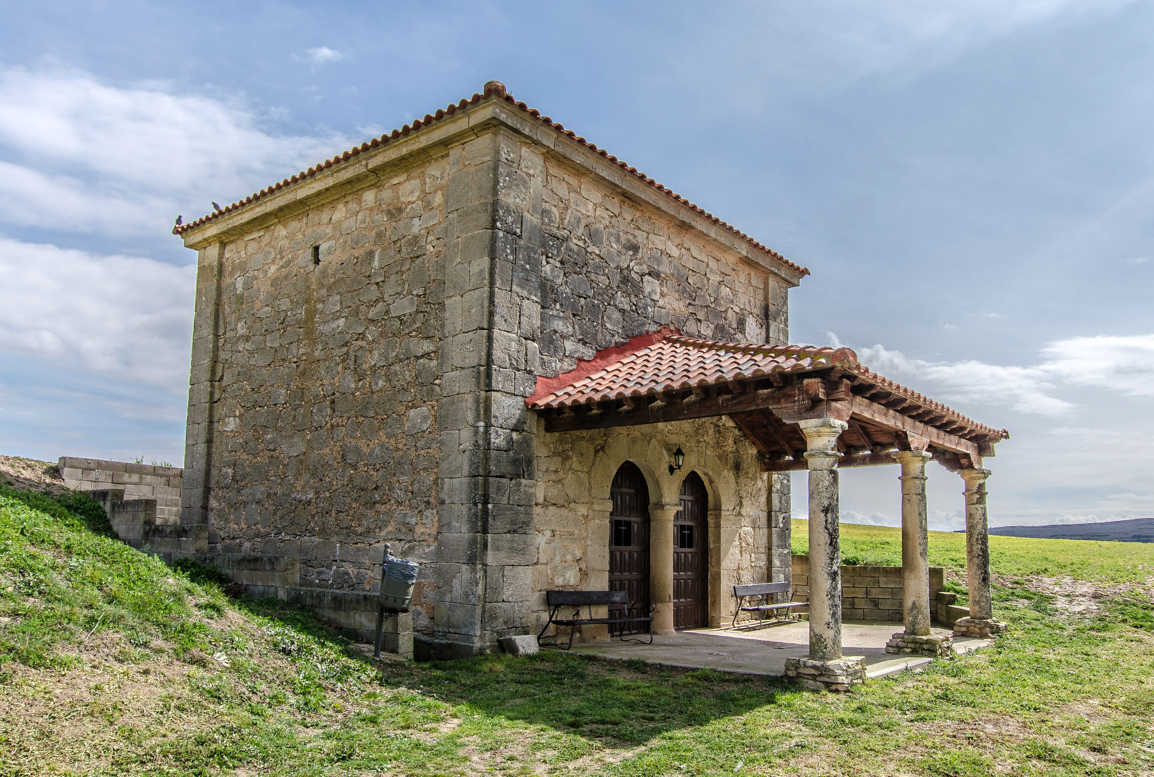 Ermita de la Soledad en Arbancón (Guadalajara)